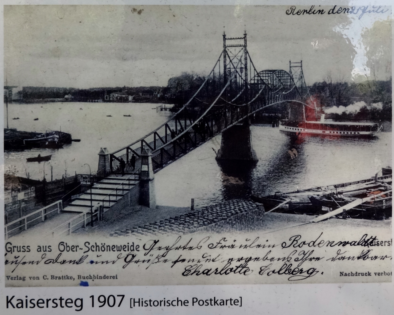 Kaisersteg in Berlin-Niederschöneweide im Jahr 1907; Aufnahme auf einer öffentlich zugänglichen Informationsstele am Aufgang zur Brücke